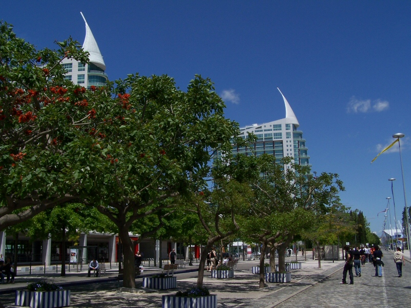 Alameda dos Oceanos